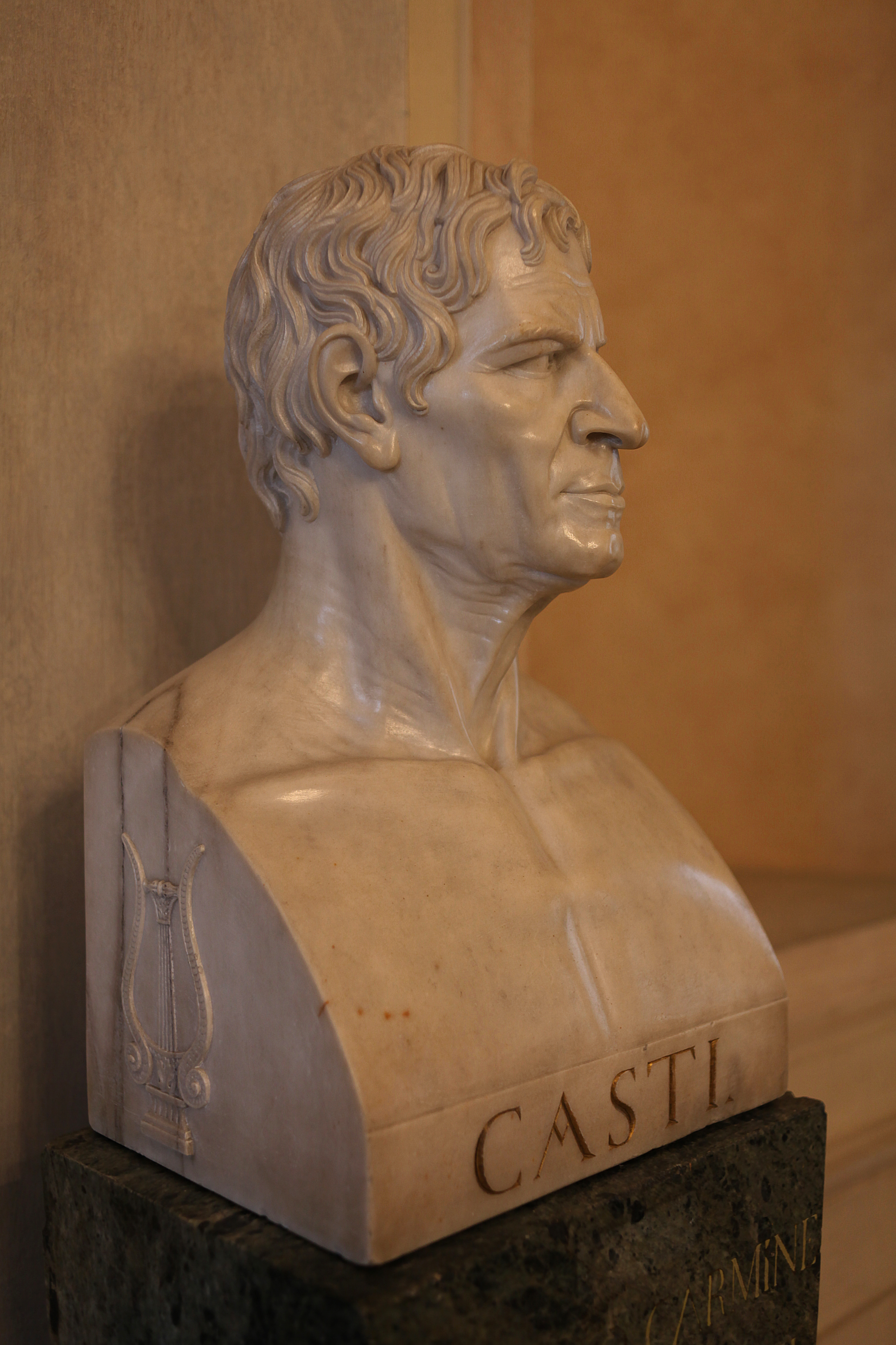 Giovanni Battista Comolli (1775-1830) Erma di Giovan Battista Casti (1804), esposta lla Galleria d'Arte Moderna di Milano